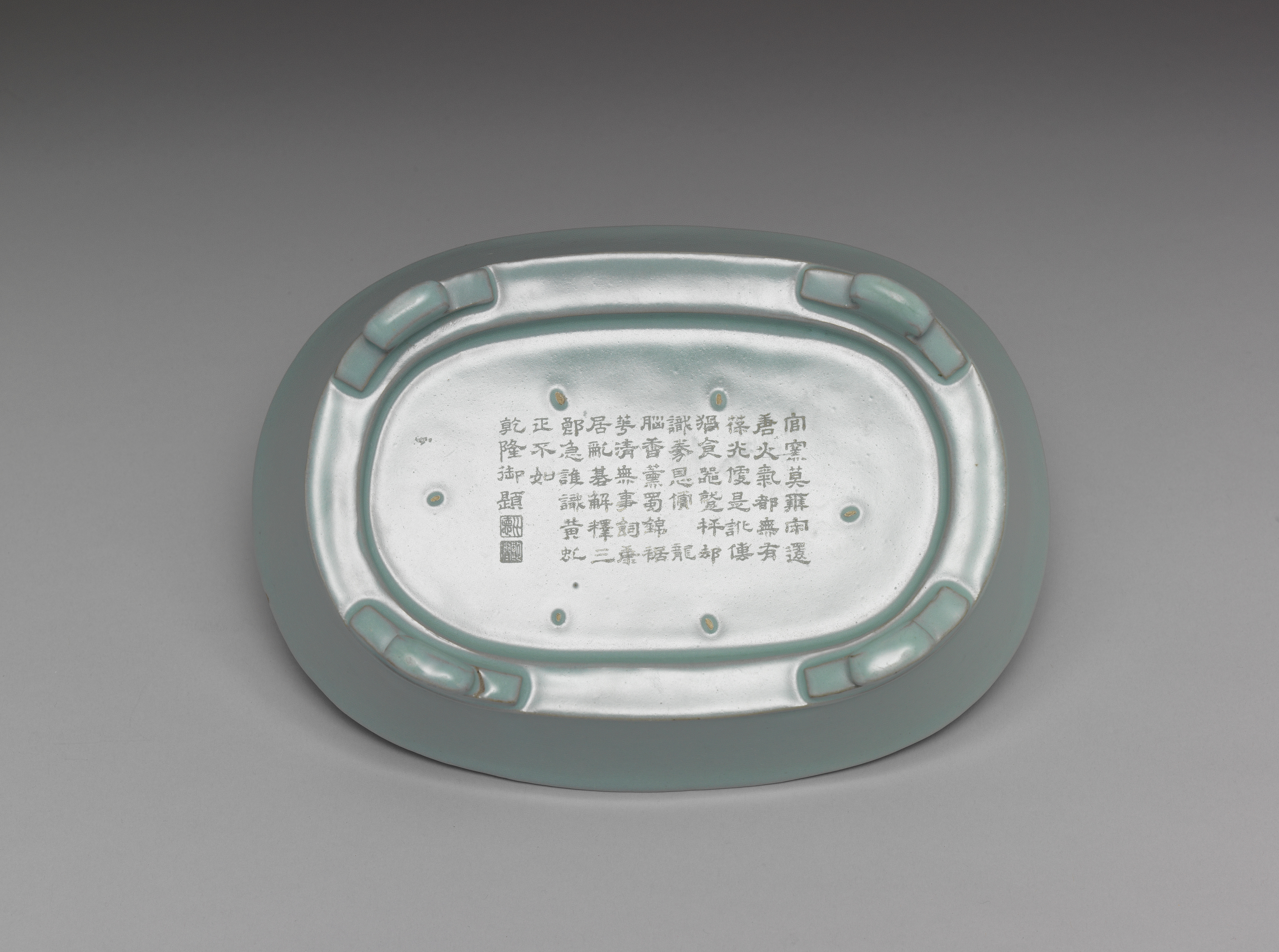 中文（中国大陆）: 官窯莫辨宋還唐，火氣都無有葆光。便是訛傳猧食器，蹵枰却識豢恩償。龍腦香薰蜀錦裾，華清無事飼康居。亂碁解釋三郎急，誰識黃虬正不如。乾隆御題。(下接二鈐印)比德。朗潤。